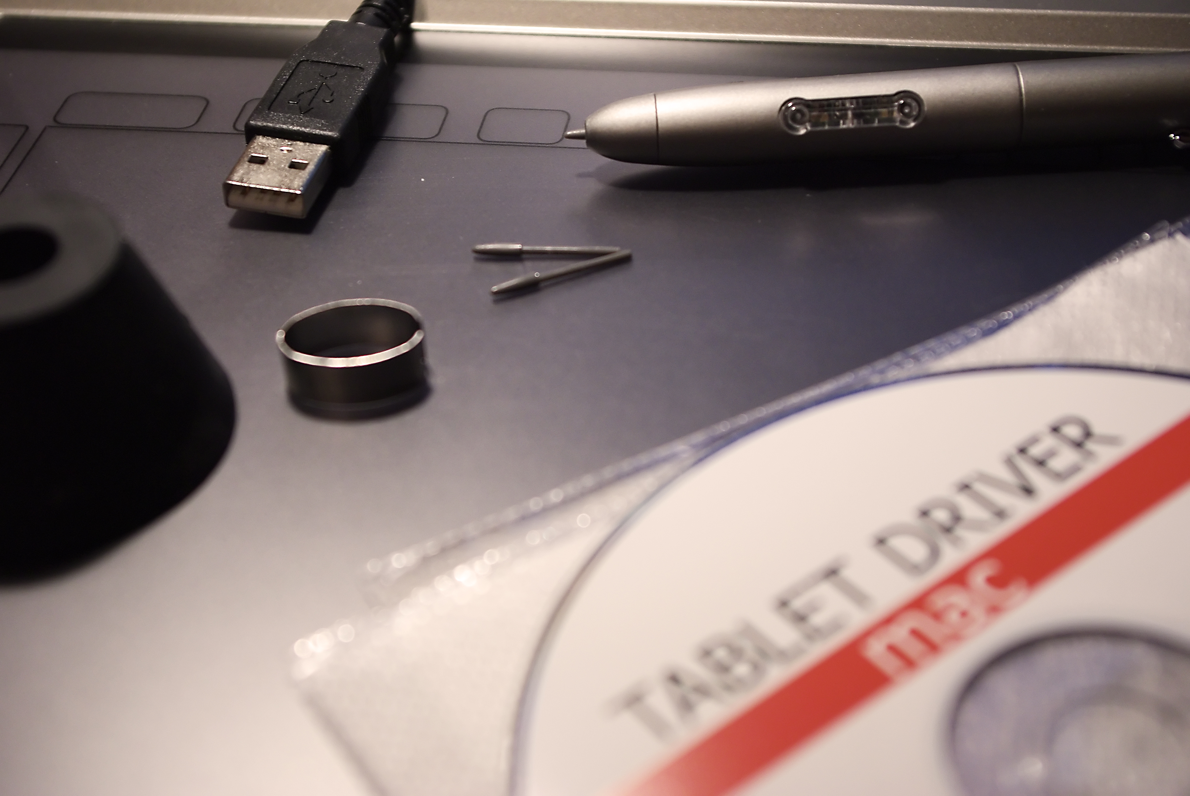 Digitaallaua komplekteerimine